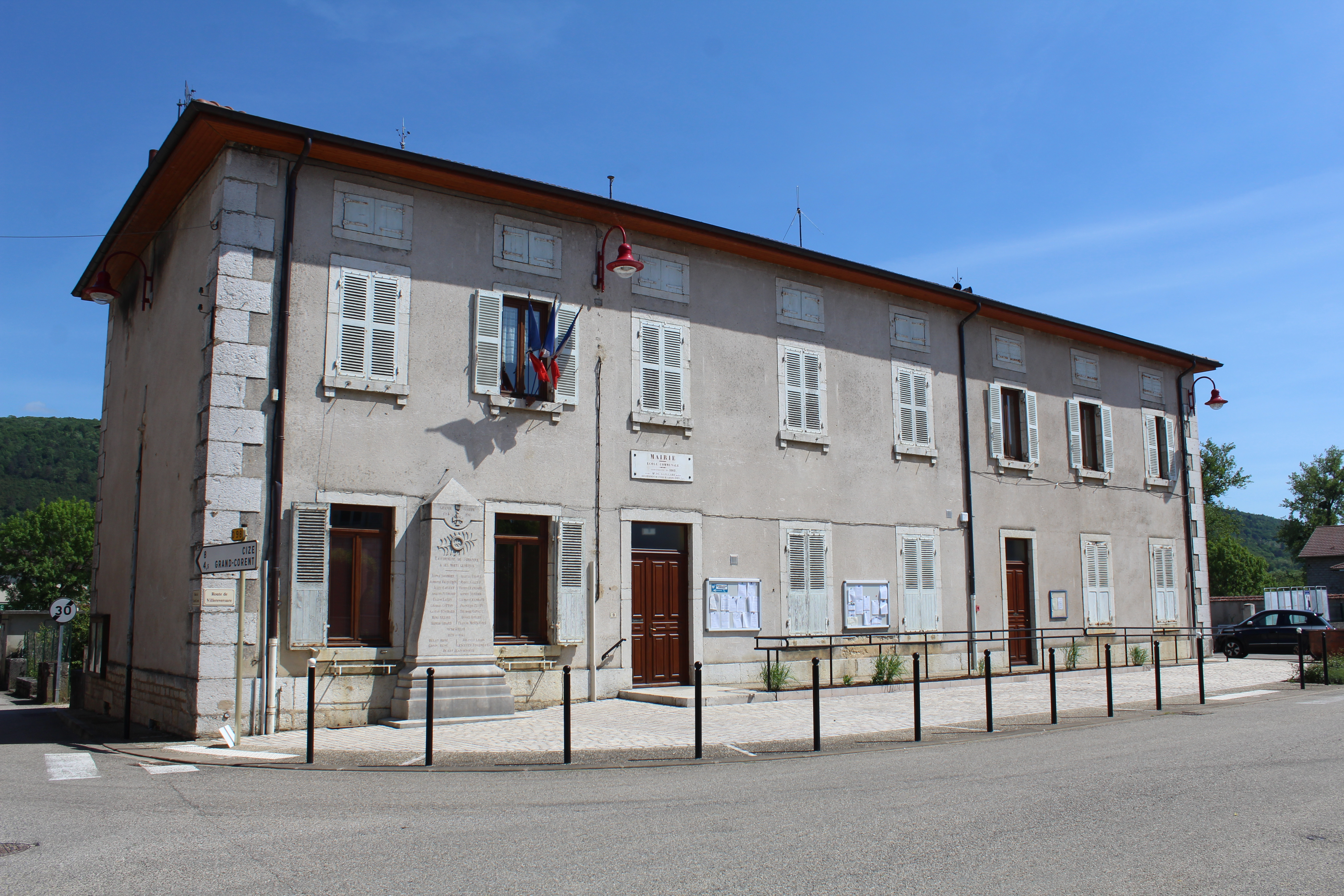 Mairie de Simandre-sur-Suran.